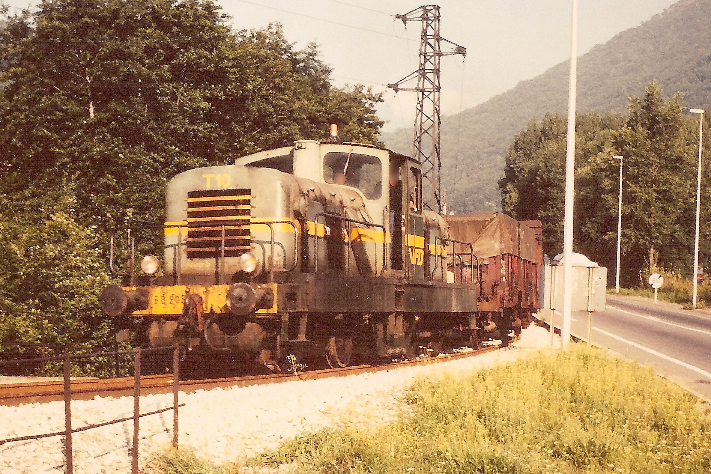 Photo 7. Train de marchandises sur la ligne Jarrie-Vizille.